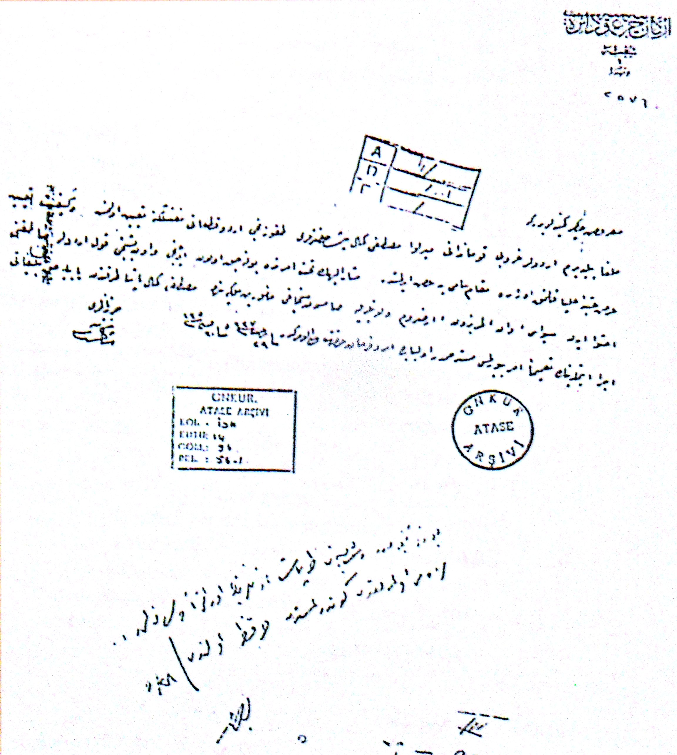 Harbiye Nezareti'nin Mustafa Kemal'in 9. Ordu Kıtaatı Müfettişliği'ne tayin yazısı.